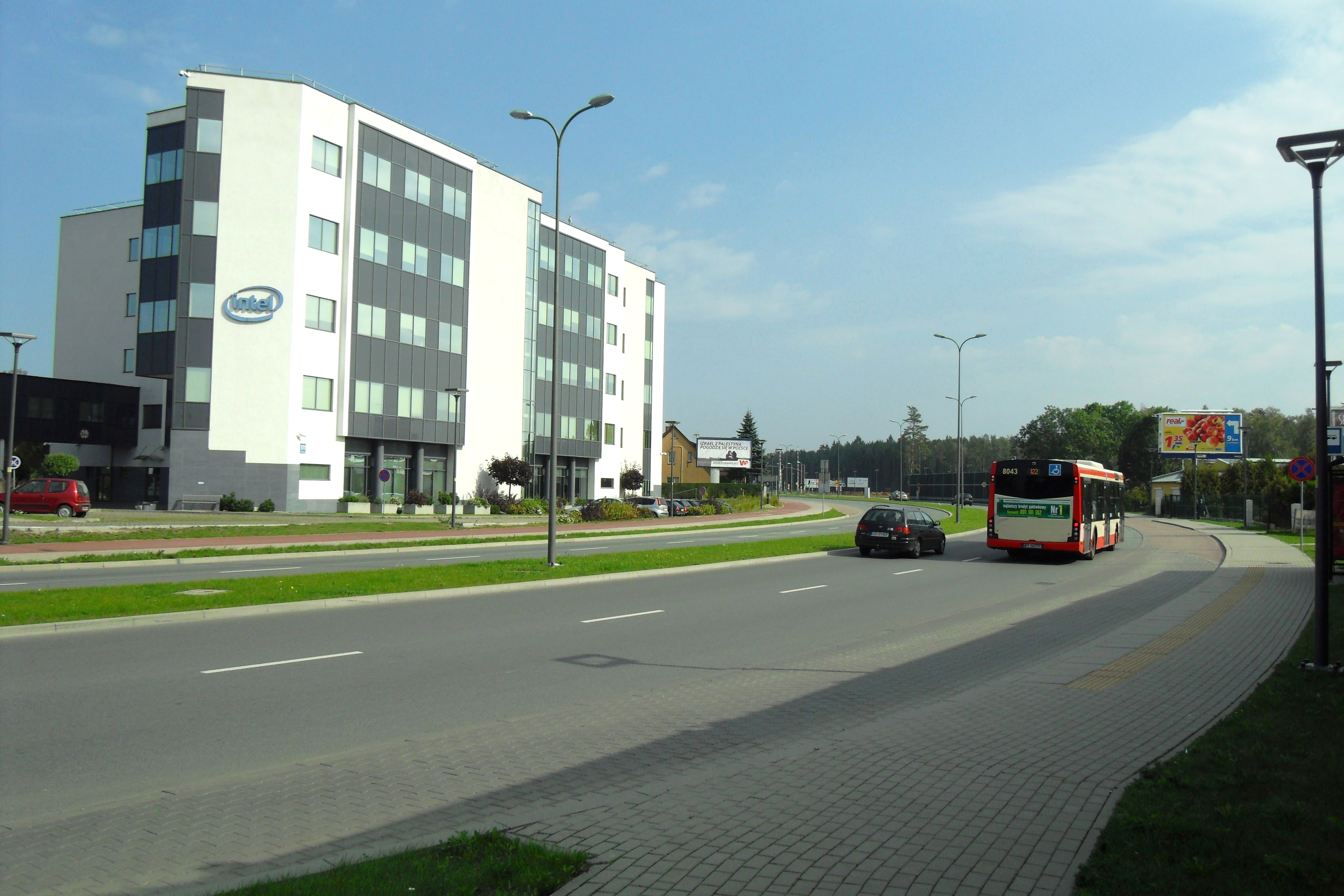 Gdańsk Firoga, ul. (nowa) Słowackiego.